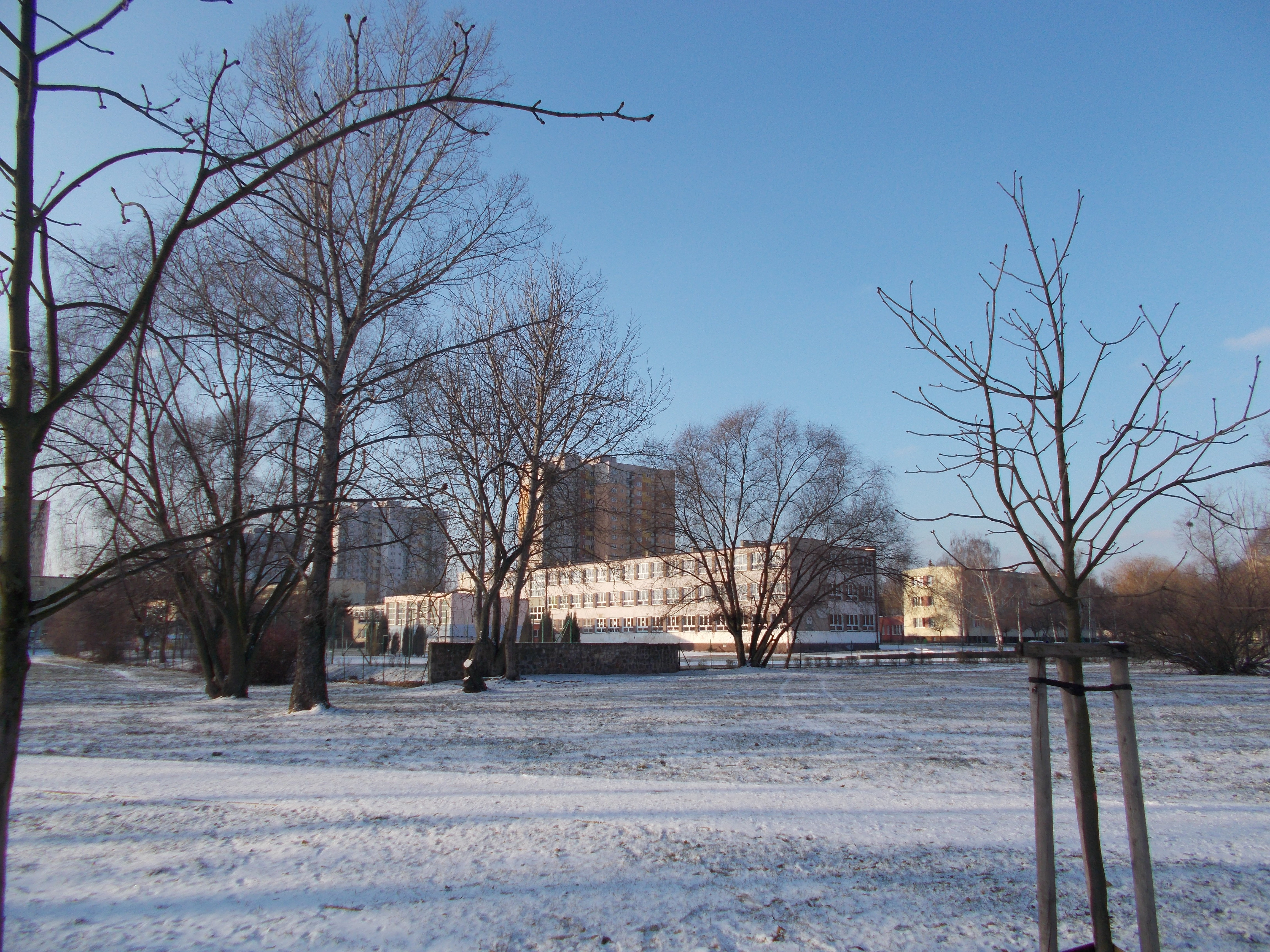 Osiedle Rzeczypospolitej w Poznaniu.Widok na Szkołę Podstawową nr 20 od strony osiedla Powstań Narodowych..